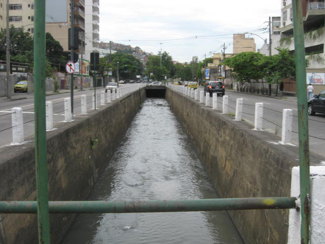 Rio Joana, 5.500 metros com desague no Canal do Mangue.